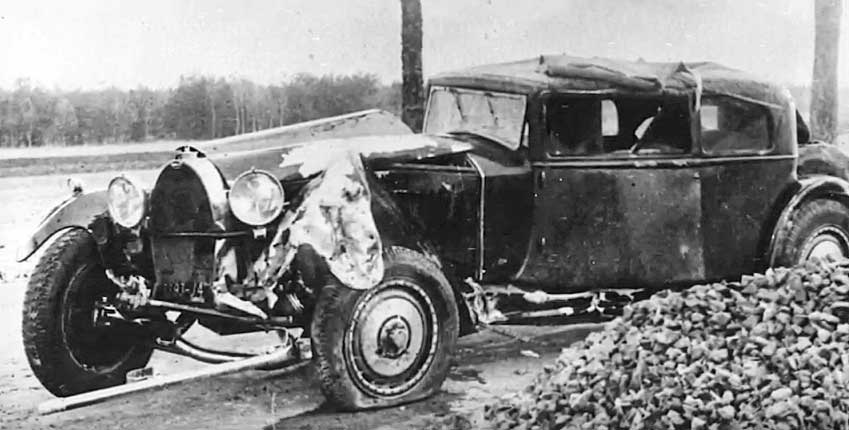 Bugatti Type 41 Royale Packard après son accident en 1931, conduite par Ettore Bugatti